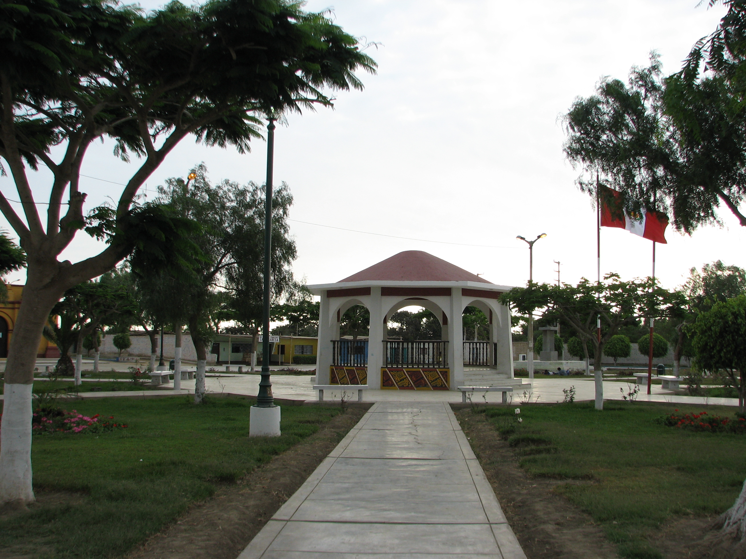 Central plaza in Magdalena del Cao, Ascope province, La Libertad region, Peru.